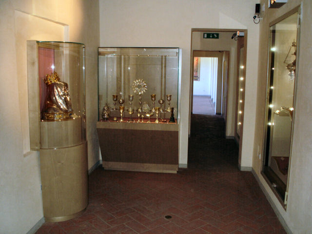 Certaldo, Museo Arte Sacra, sale II, III, IV